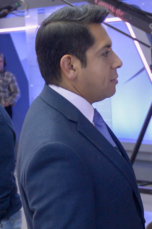 Ministro Díaz participa en noticiarios de Mega y TVN para explicar como se desarrolla el Proceso Constituyente